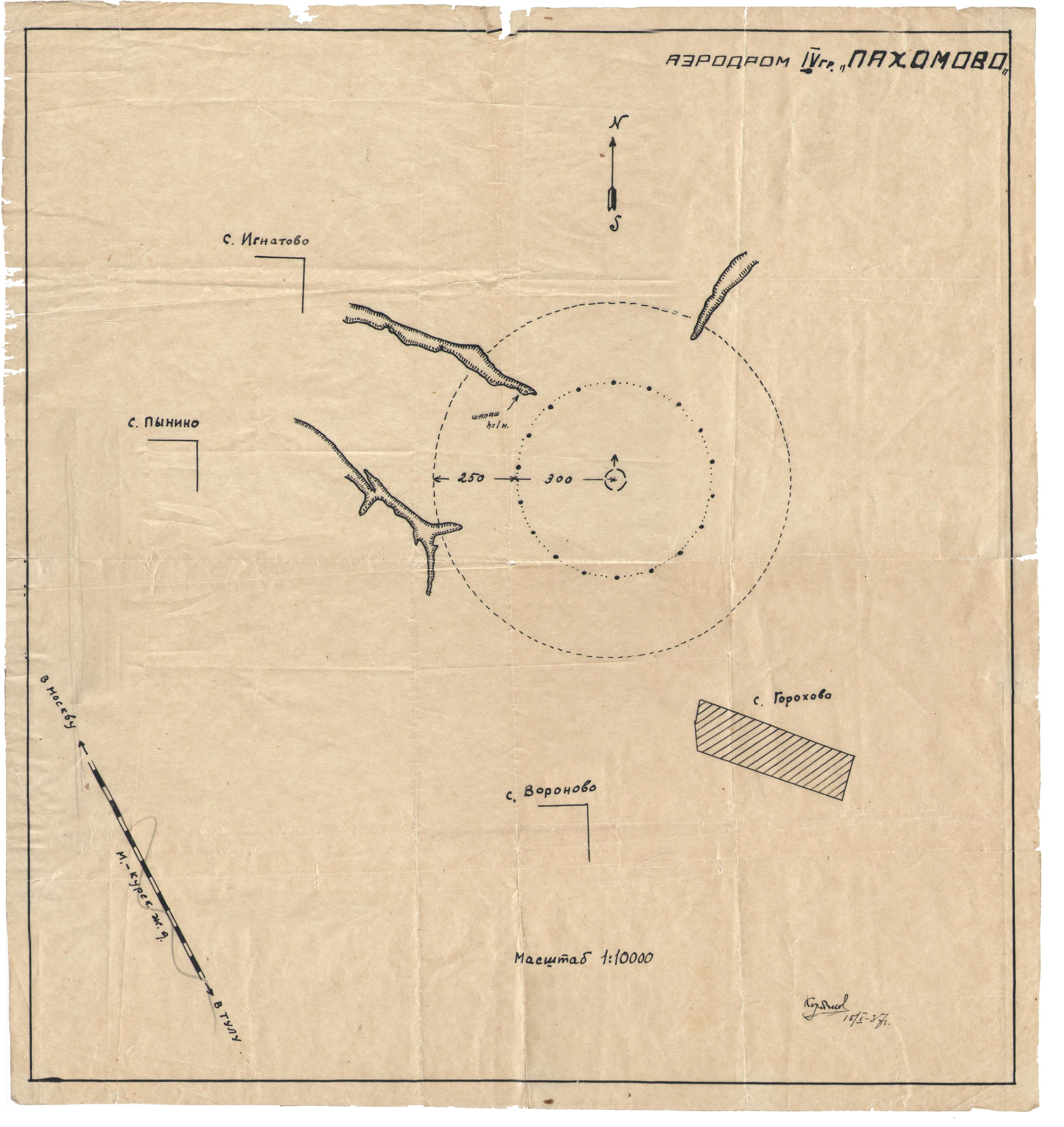 Документ 1937 года найденный где то в архивах. В нижней правой части видна подпись ответственного лица и дата создания этого документа "15/1 1937".